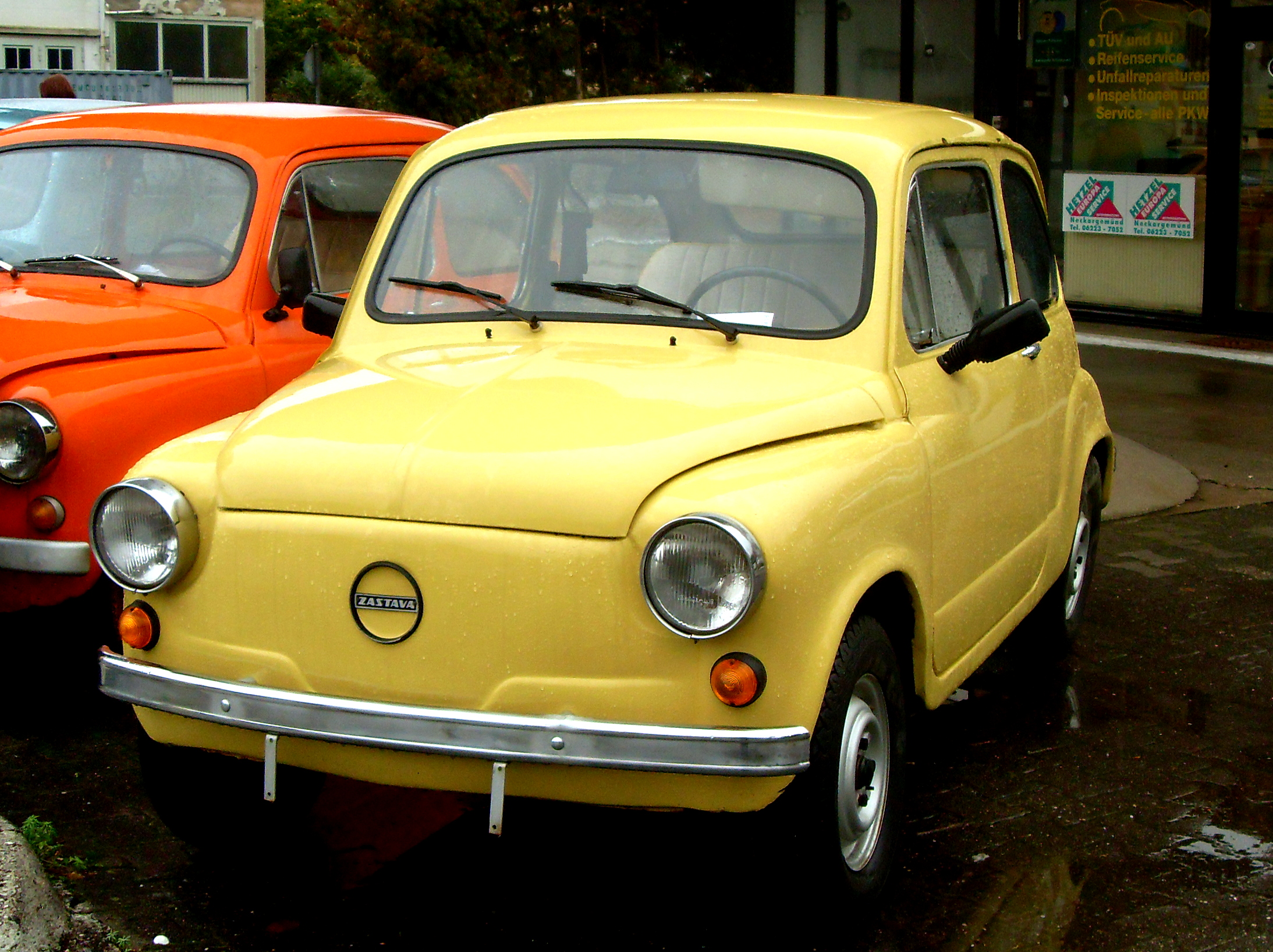 Zastava 750 w Neckargemünd (Niemcy).